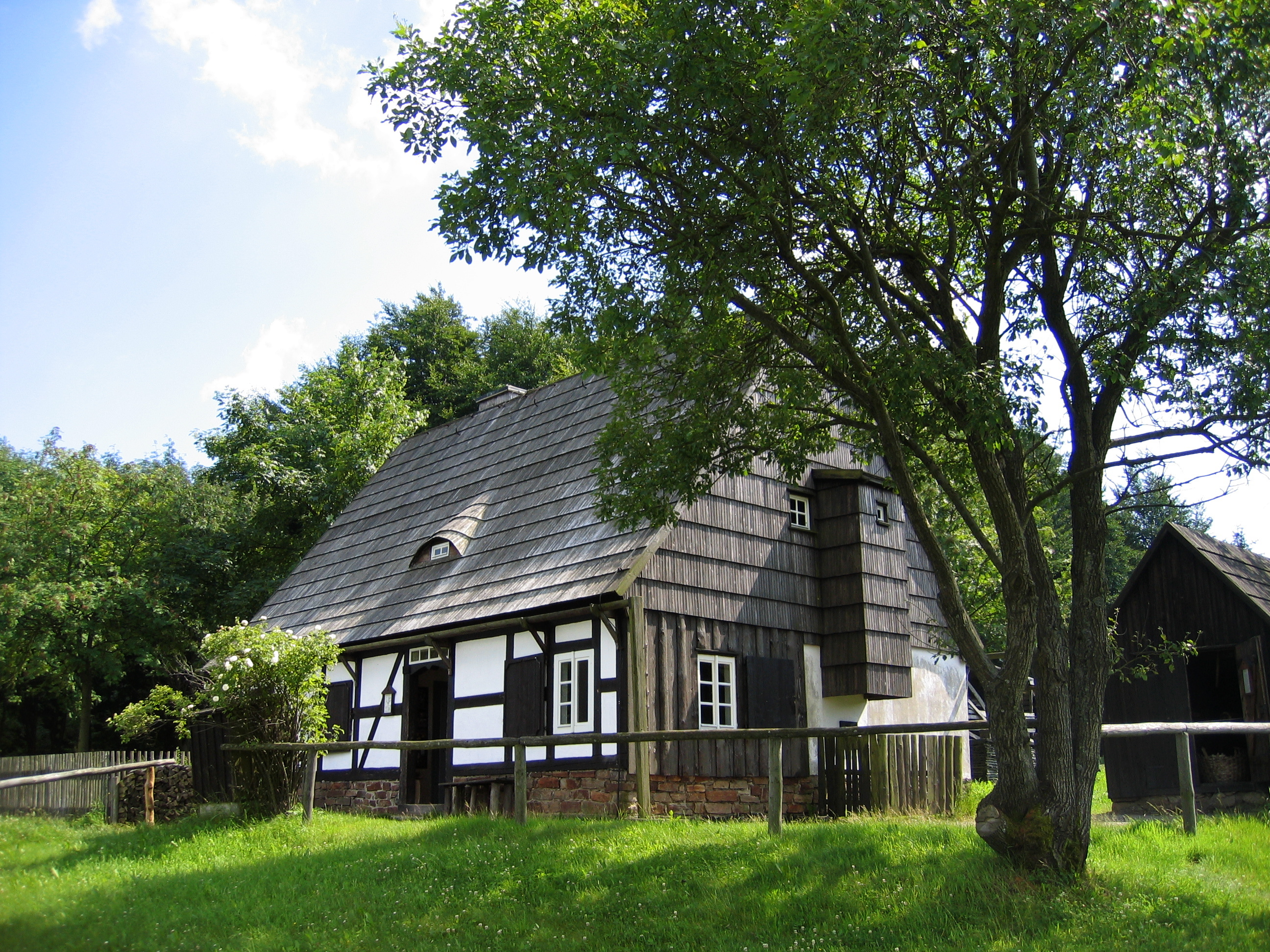 Erzgebirgisches Freilichtmuseum Seiffen, Juli 2009